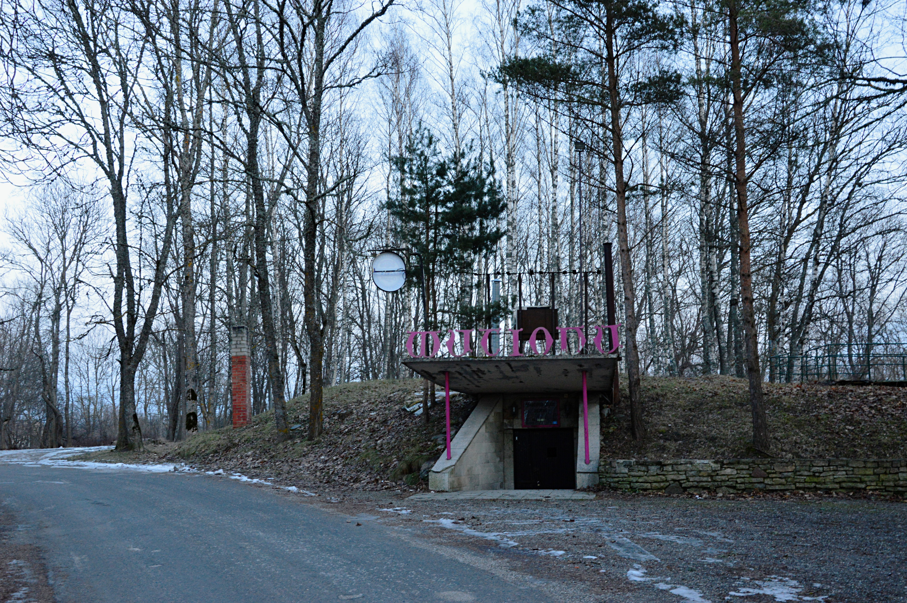 Virtsu mõisa peahoone põles 1917. Säilis kelder, mis kohendati 1970. aastatel baariruumideks. Mõisa peahoone kelder on arvatud kultuurimälestiseks.